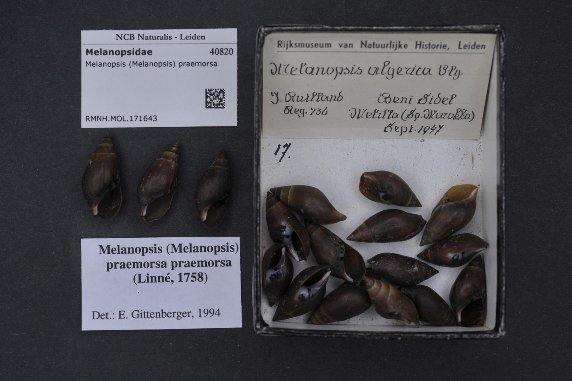 Melanopsis praemorsa (Linnaeus, 1758)